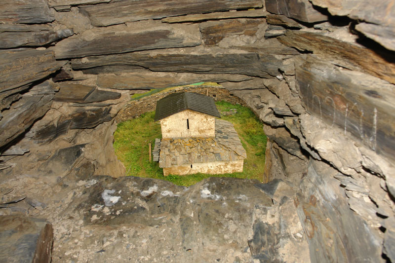 უშგულის ლამარია